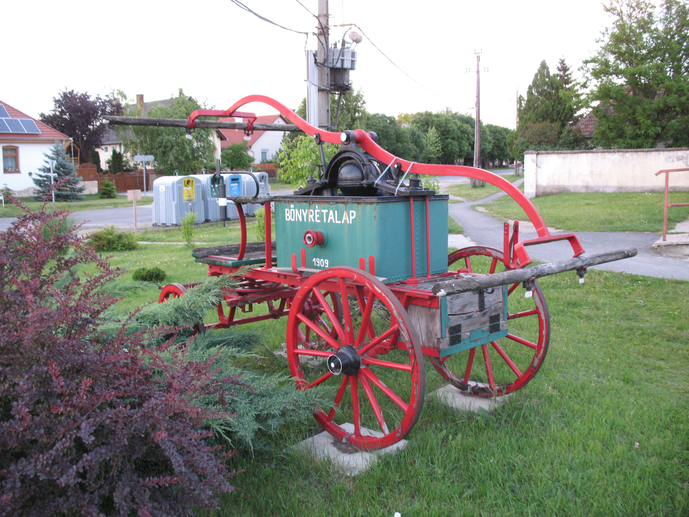 Bőny falu